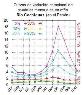 Curva de Variación Estacional del río Cochiguaz en El Peñón. # cita publicación # | apellido = Dirección General de Aguas # | nombre = # | enlace-autor = Ministerio de Obras Públicas (Chile) # | título = Diagnóstico y clasificación de los cursos y cuerpos de agua según objetivos de calidad. Cuenca del río Elqui. # | ubicación = Santiago de Chile # | editorial = Ministerio de Obras Públicas (Chile) # | año = 2004 # | edición = # | url = # | urlarchivo = # | fechaarchivo = 20070927201320 # | ref = harv # Tabla 4.6 (m3/s) pág. 48 mes 5% 10% 20% 50% 85% 95% abr 5.480 3.978 2.747 1.464 0.824 0.660 may 3.785 3.151 2.524 1.651 0.979 0.720 jun 3.750 3.137 2.527 1.672 1.005 0.745 jul 3.071 2.720 2.336 1.711 1.103 0.814 ago 3.270 2.825 2.366 1.686 1.111 0.869 sep 4.027 3.274 2.595 1.778 1.270 1.110 oct 5.685 4.383 3.255 1.976 1.252 1.043 nov 10.476 7.254 4.728 2.267 1.159 0.902 dic 18.239 10.727 5.799 2.109 1.001 0.830 ene 13.958 8.303 4.499 1.547 0.610 0.456 feb 8.967 5.796 3.454 1.367 0.547 0.381 mar 4.985 3.868 2.844 1.581 0.767 0.501 This plot was created with Gnuplot.